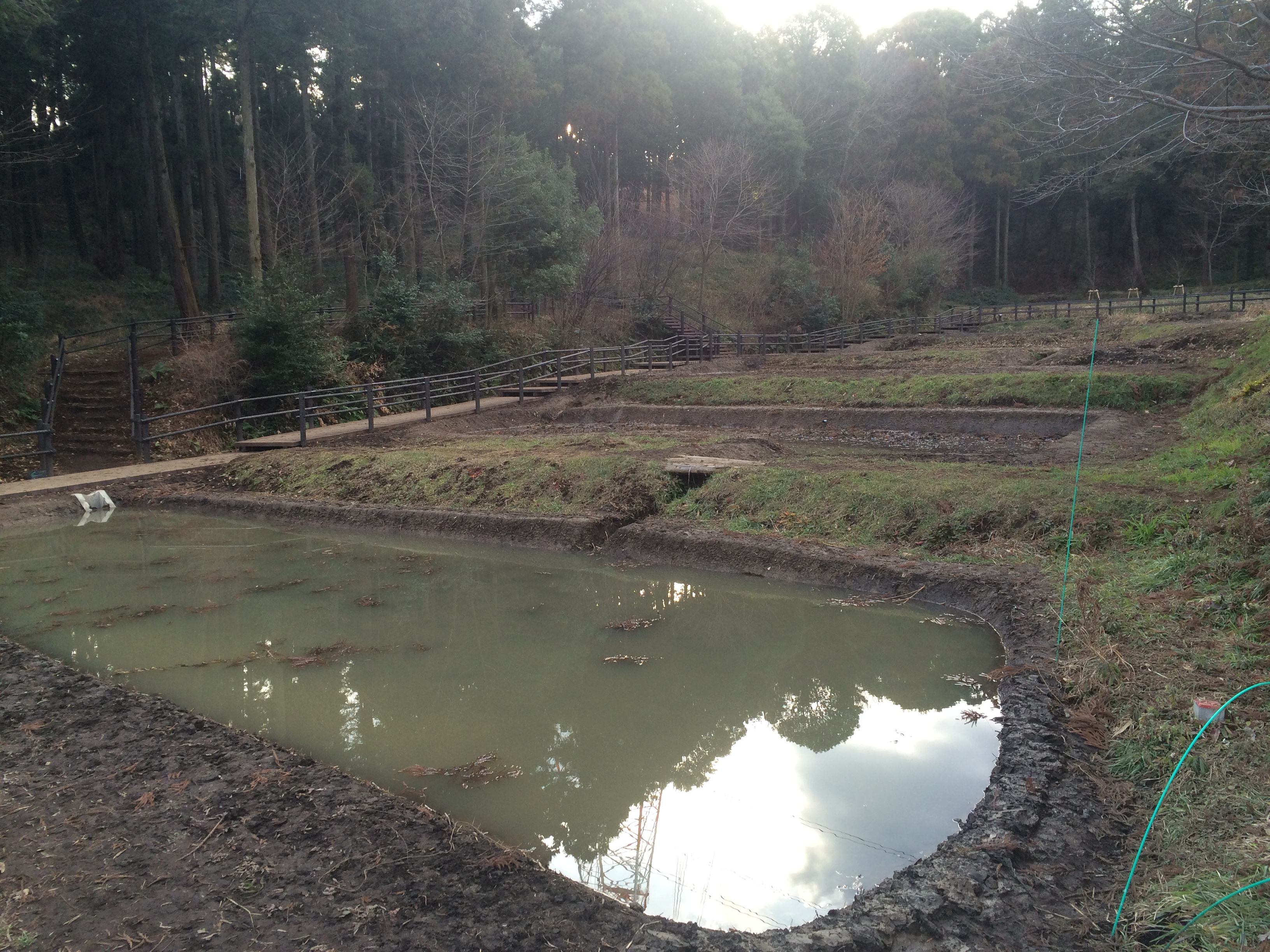 神奈川県横浜市泉区新橋町（弥生台駅の北西側）にある「新橋市民の森」（北西部）。